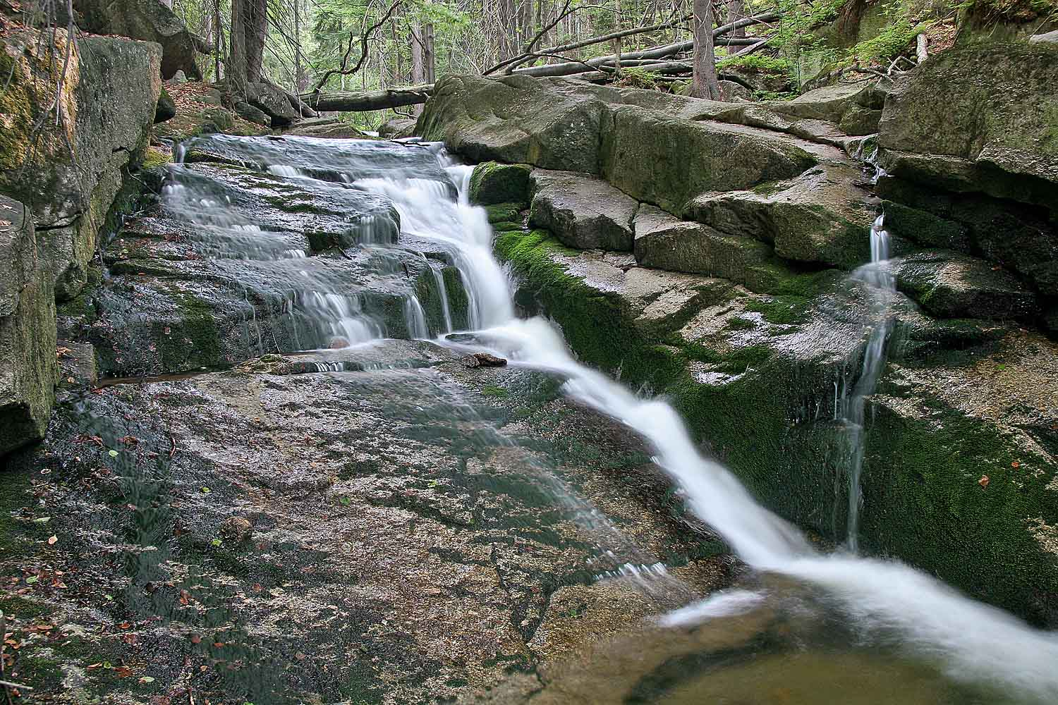 Kaskády v PR Jedlový důl Autor:Zp